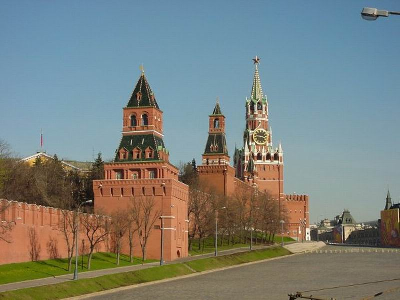 Kreml_Moskau, eigenes Foto von 2003, public domain. Mewes 19:06, 18. Mär 2005 (CET) Ostmauer